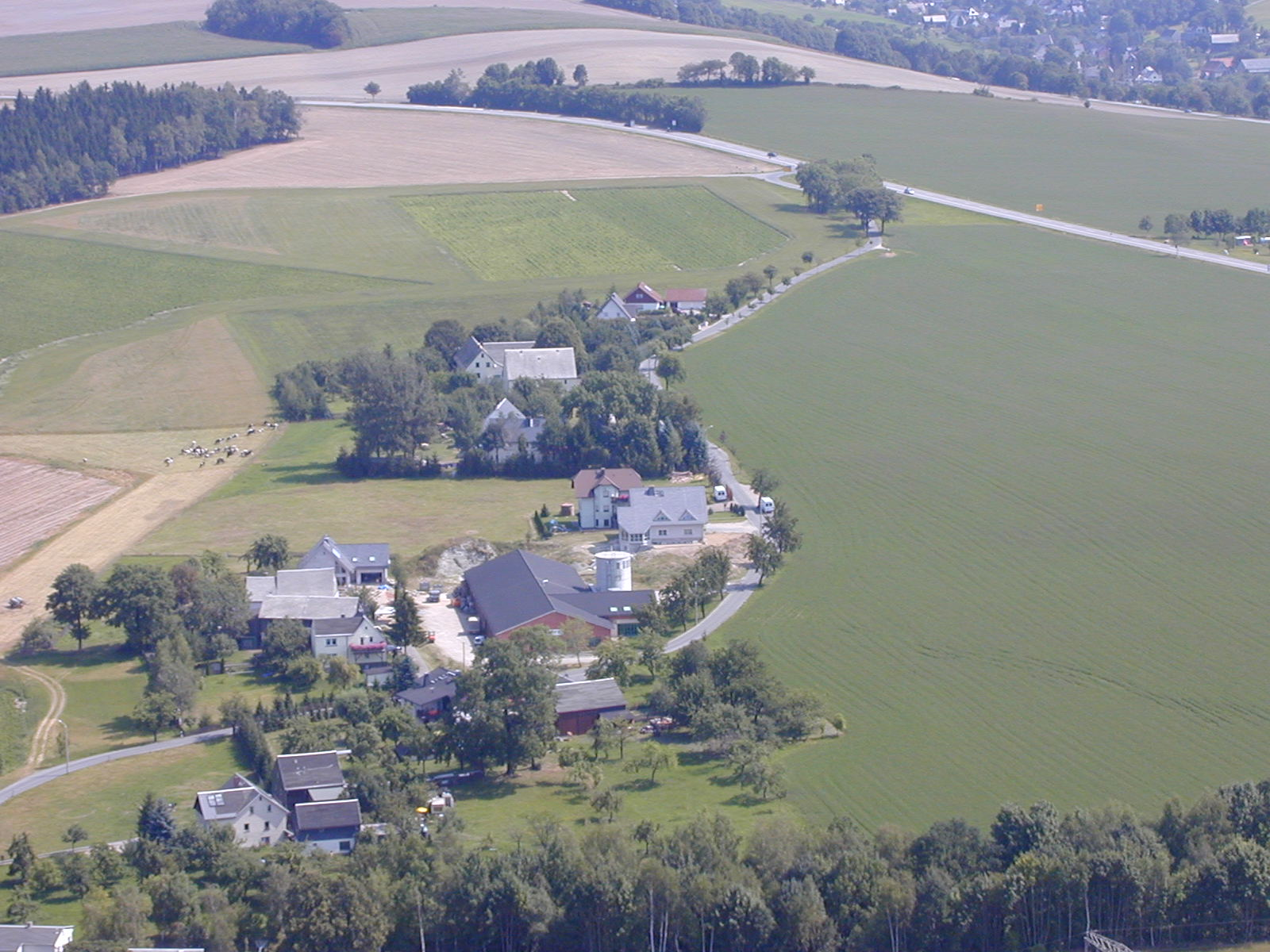 Luftbild des Ortsteils Grüna der Stadt Lößnitz (Oberer Teil).